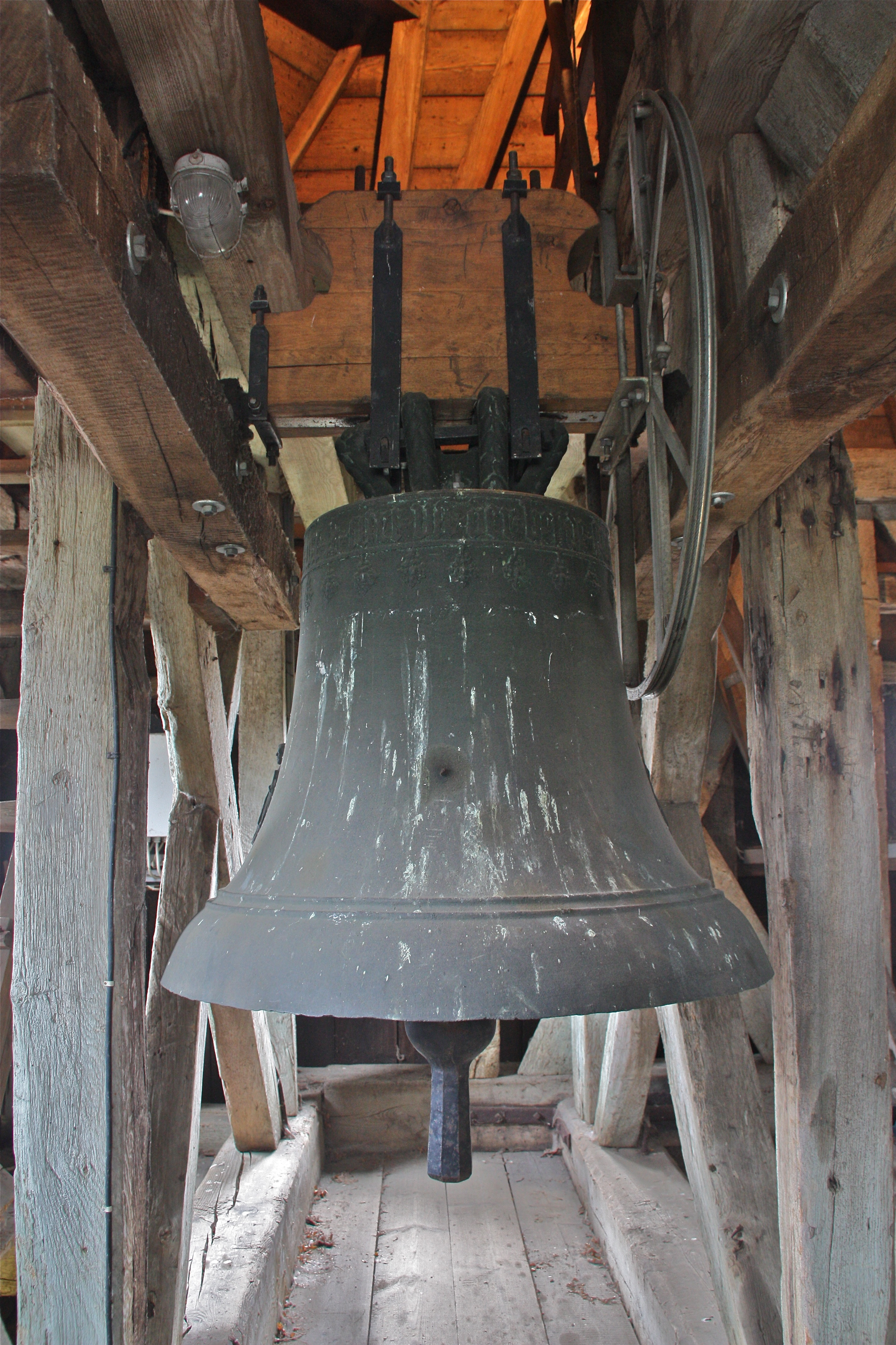 This is a photograph of an architectural monument. Hamburg, Allermöhe-Reitbrook, Dreieinigkeitskirche, Glockenturm. Osanna-Glocke von 1483.